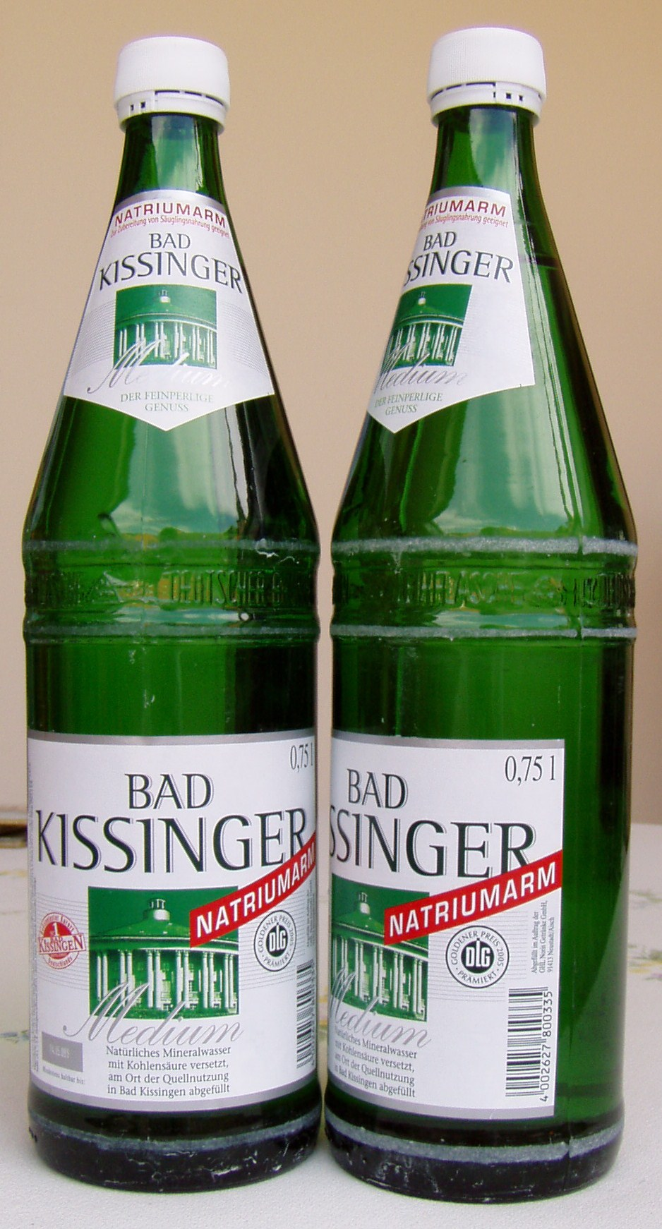 früher abgefüllte Glasflaschen mit „Bad Kissinger Wasser“ (Mineral water of Bad Kissingen)